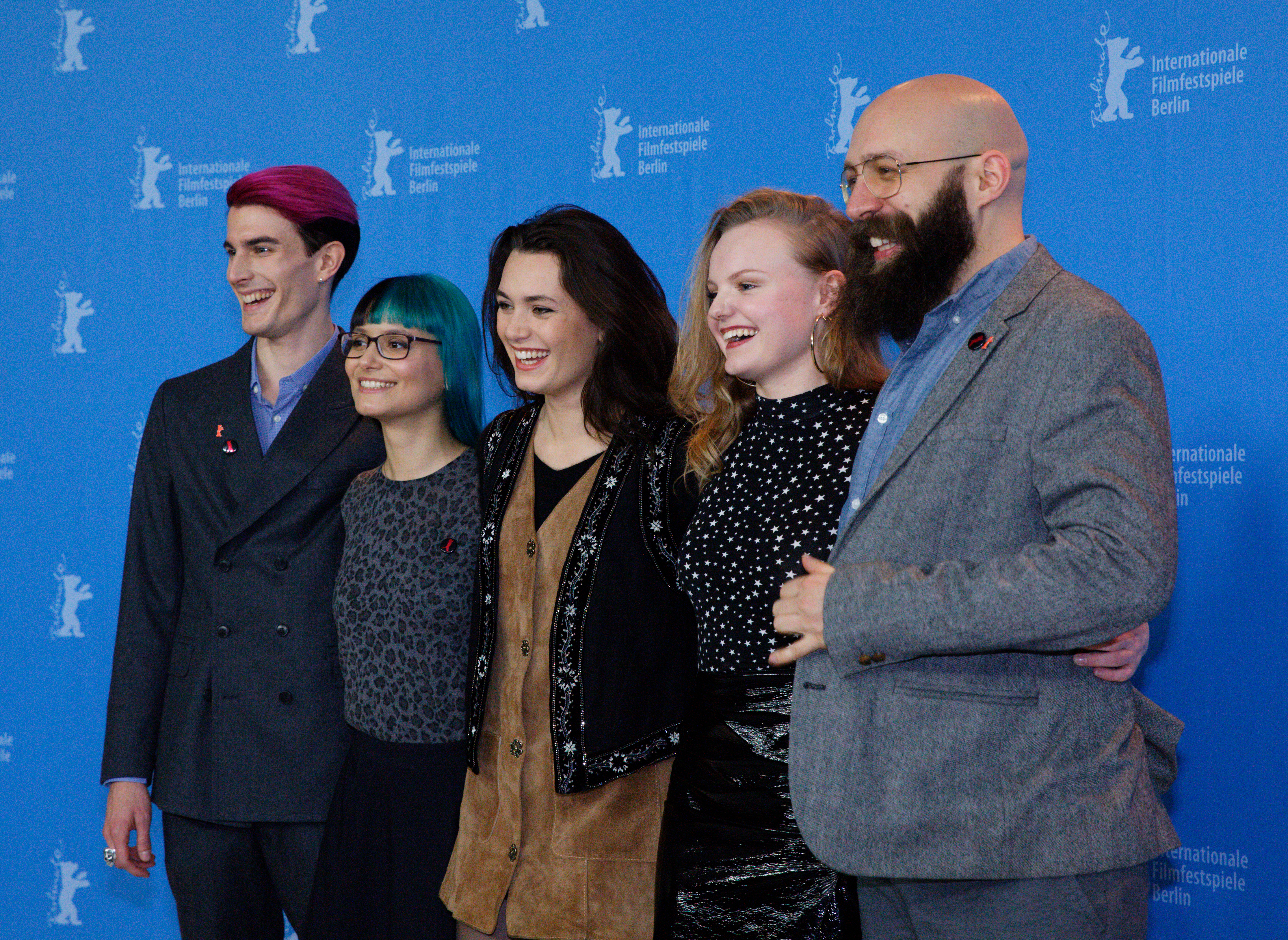 Cast & Crew beim Photo Call zu Tiger Girl bei der Berlinale 2017